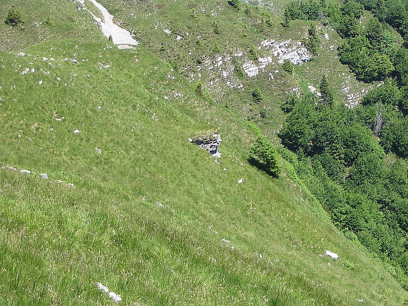 Bojni blok na Slatniku